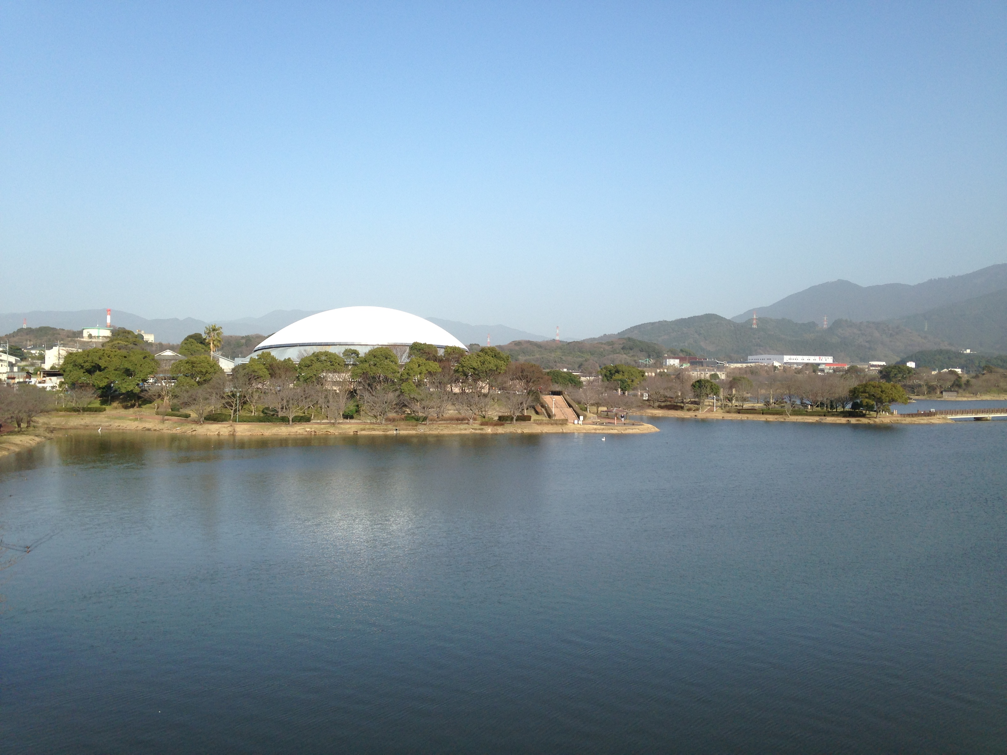 駕与丁西側の歩道橋より望む駕与丁池とかすやドーム